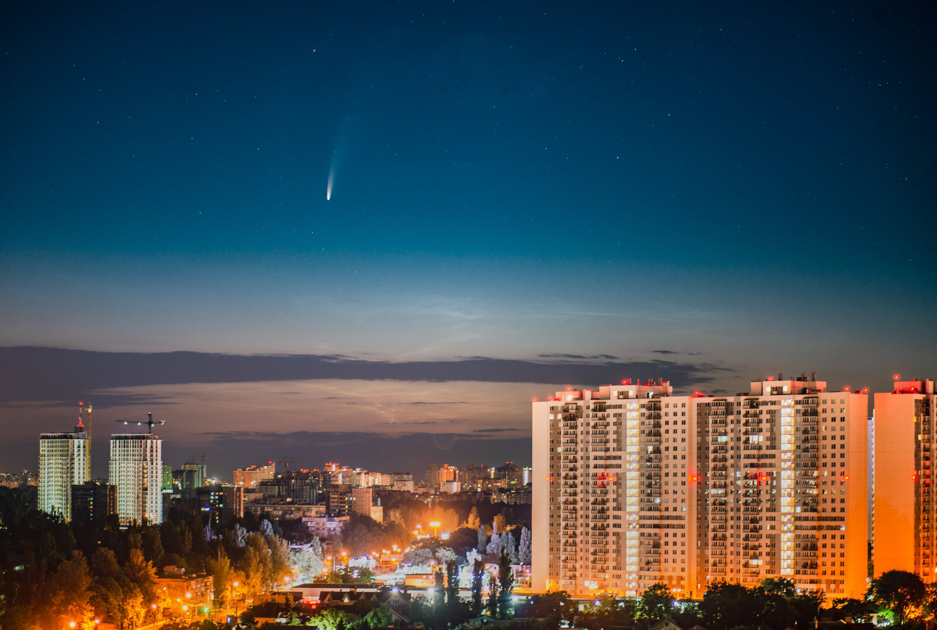 Комета C/2020 F3 (Neowise) зранку 10.07.2020 над Одесою. 03:33